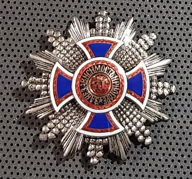 Gwiazda II kl. Orderu Daniły I (Królestwo Czarnogóry)